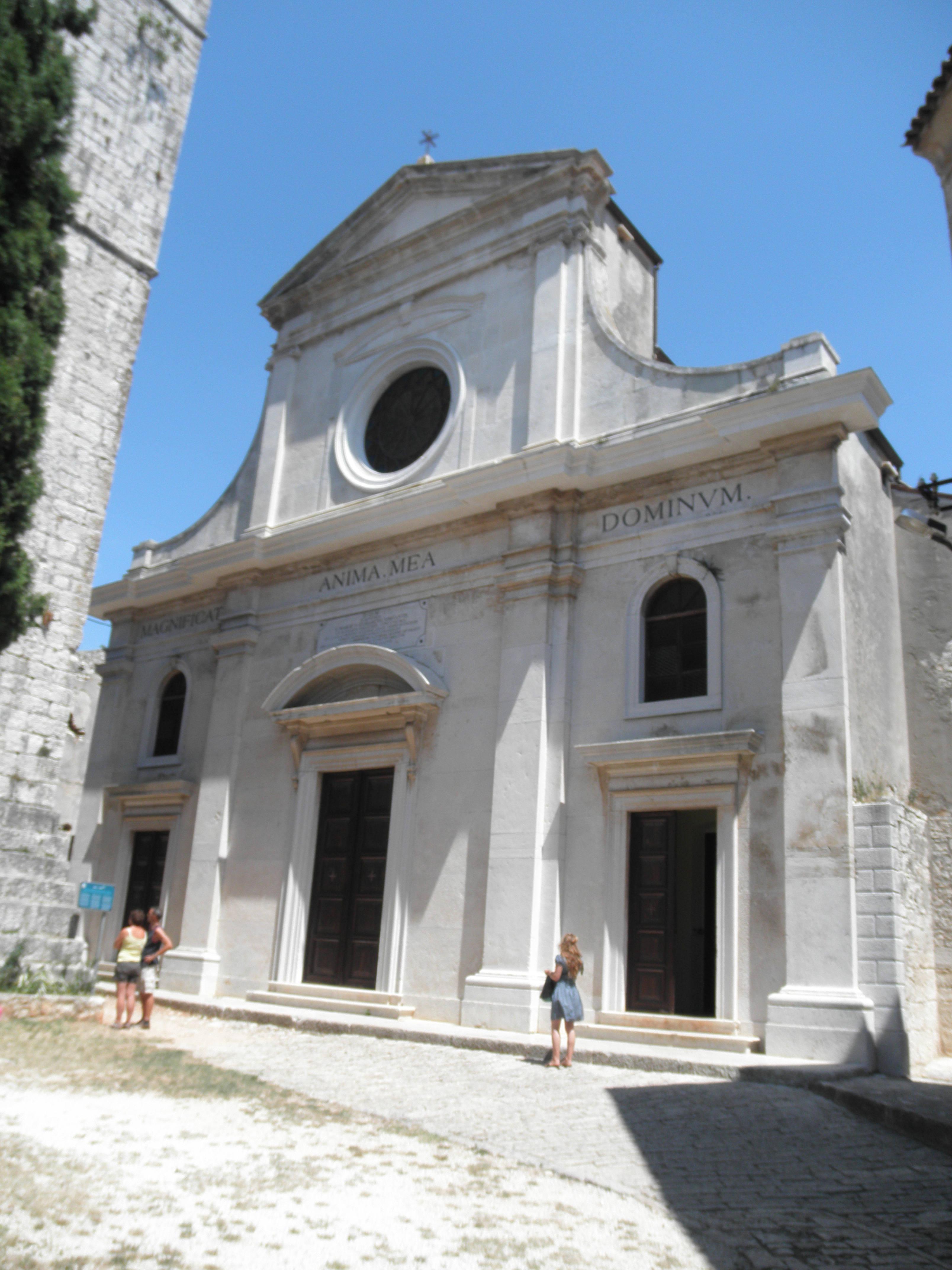 Novbaroka preĝejo San Giuliano en Bale - Valle